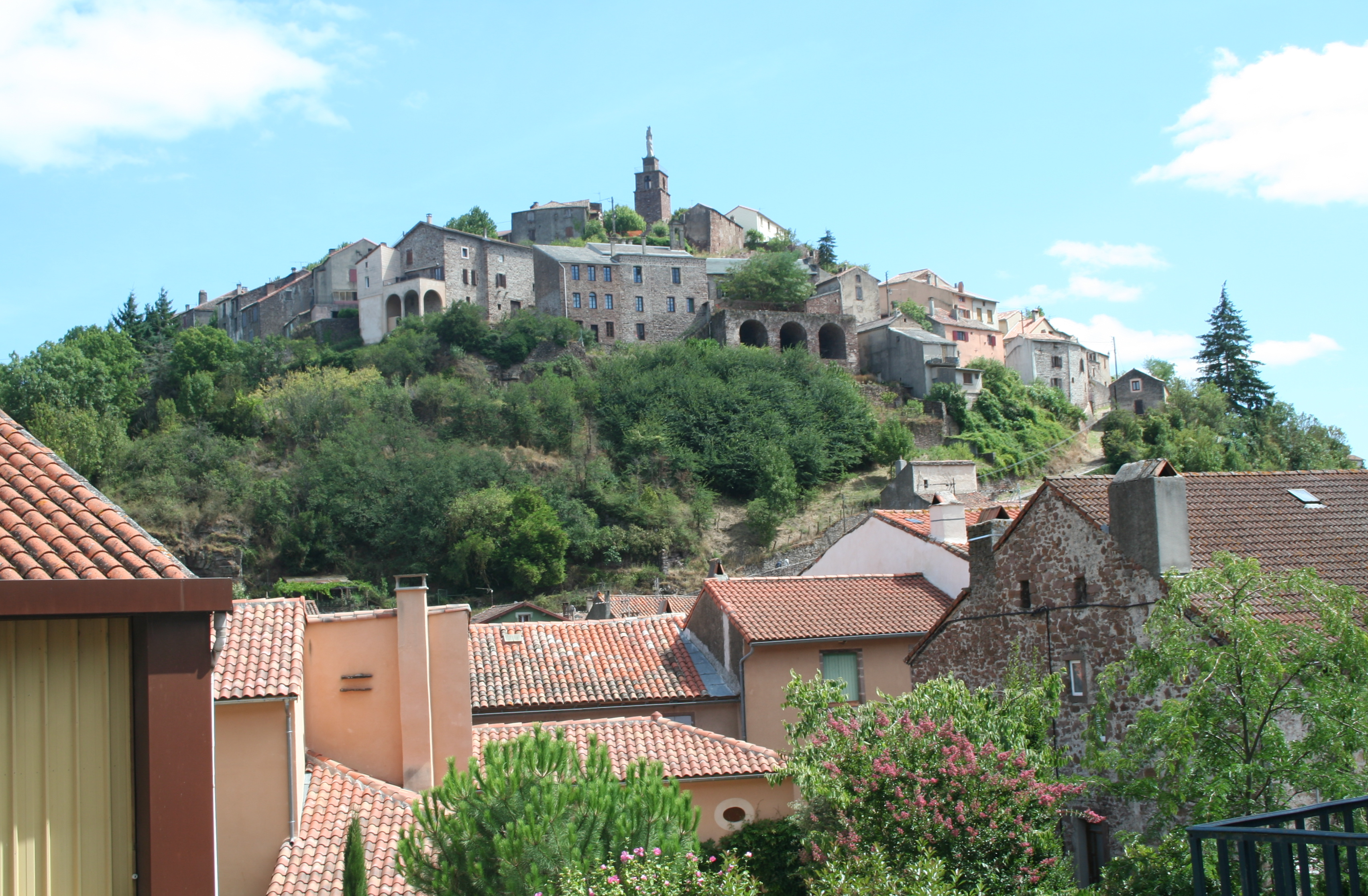 Camarès (Aveyron) - vue.